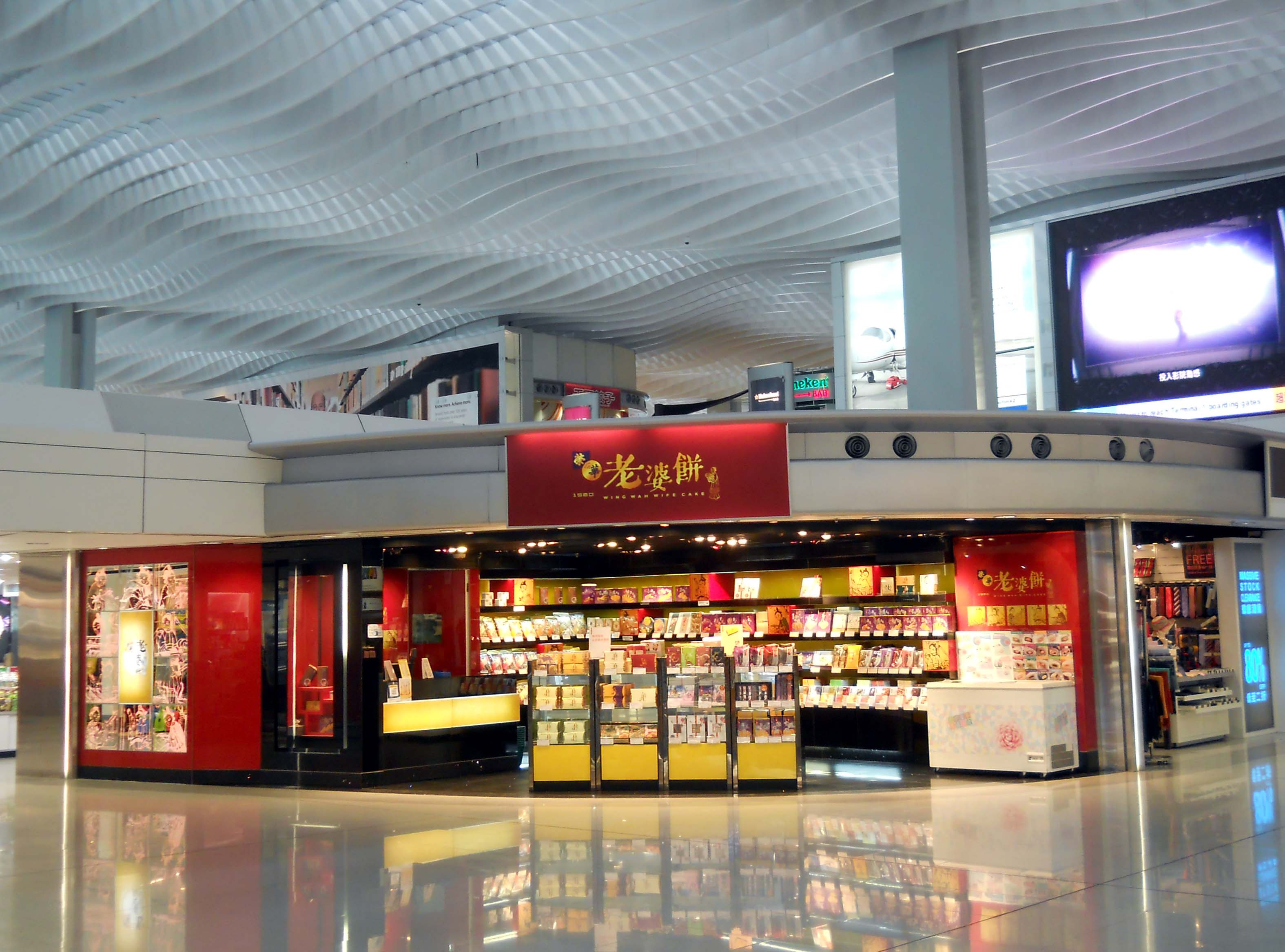 中文（香港）: 機場2號客運大樓翔天廊榮華門市